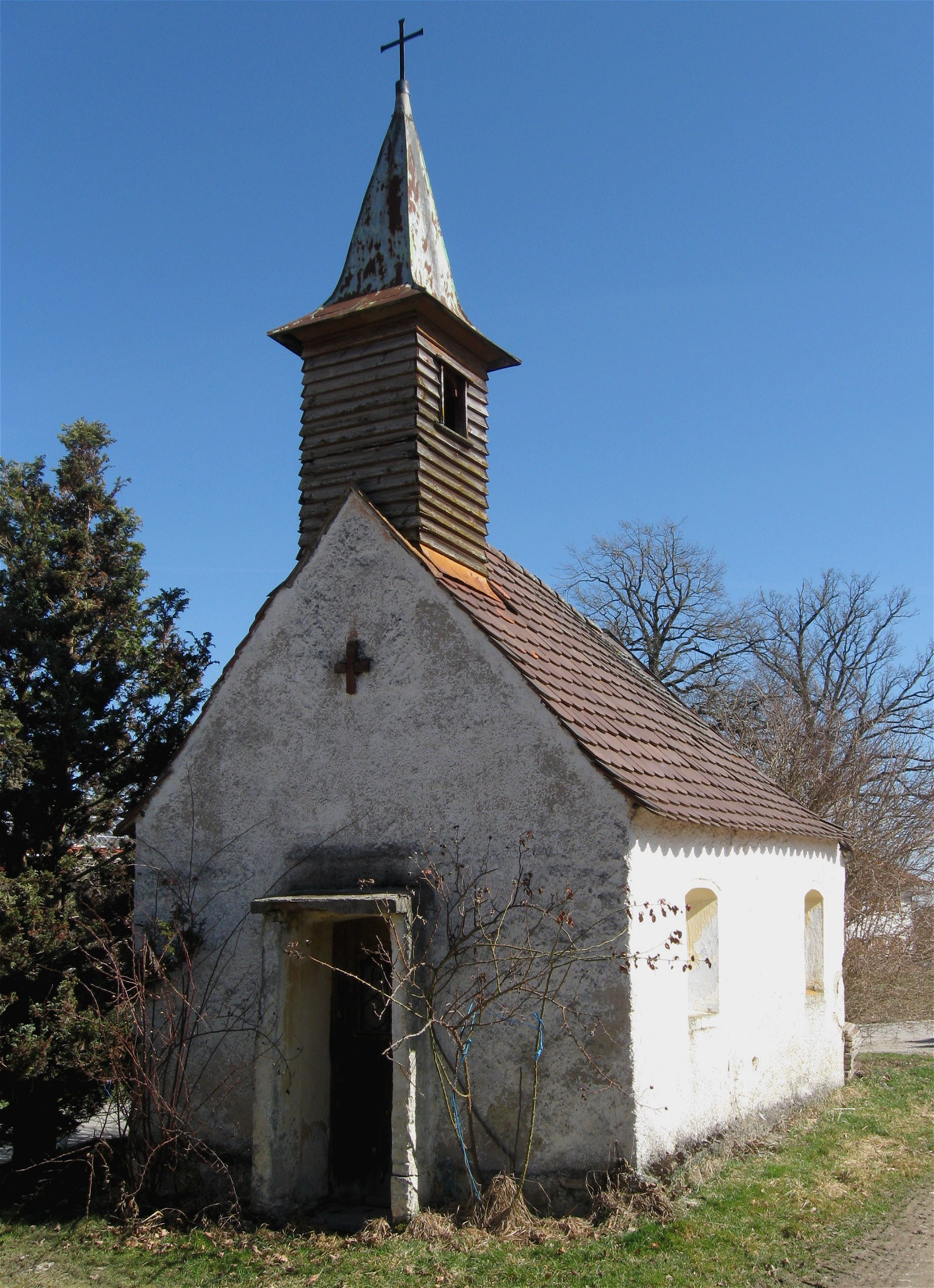 Oberhaching; Gerblinghausen; Hofkapelle; mit Dachreiter, 1. Hälfte 18. Jh.; mit Ausstattung